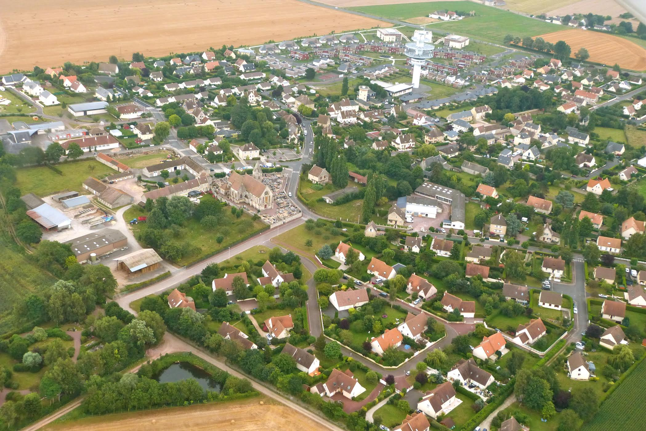 PHOTO AERIENNE DE SAINT-CONTEST